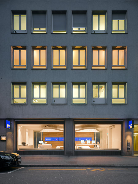 VZ VermögensZentrum, Hauptsitz Zürich